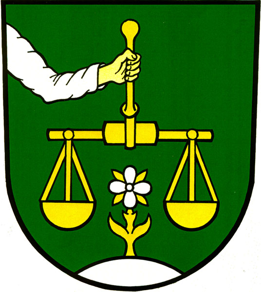 Znak obce Oborná